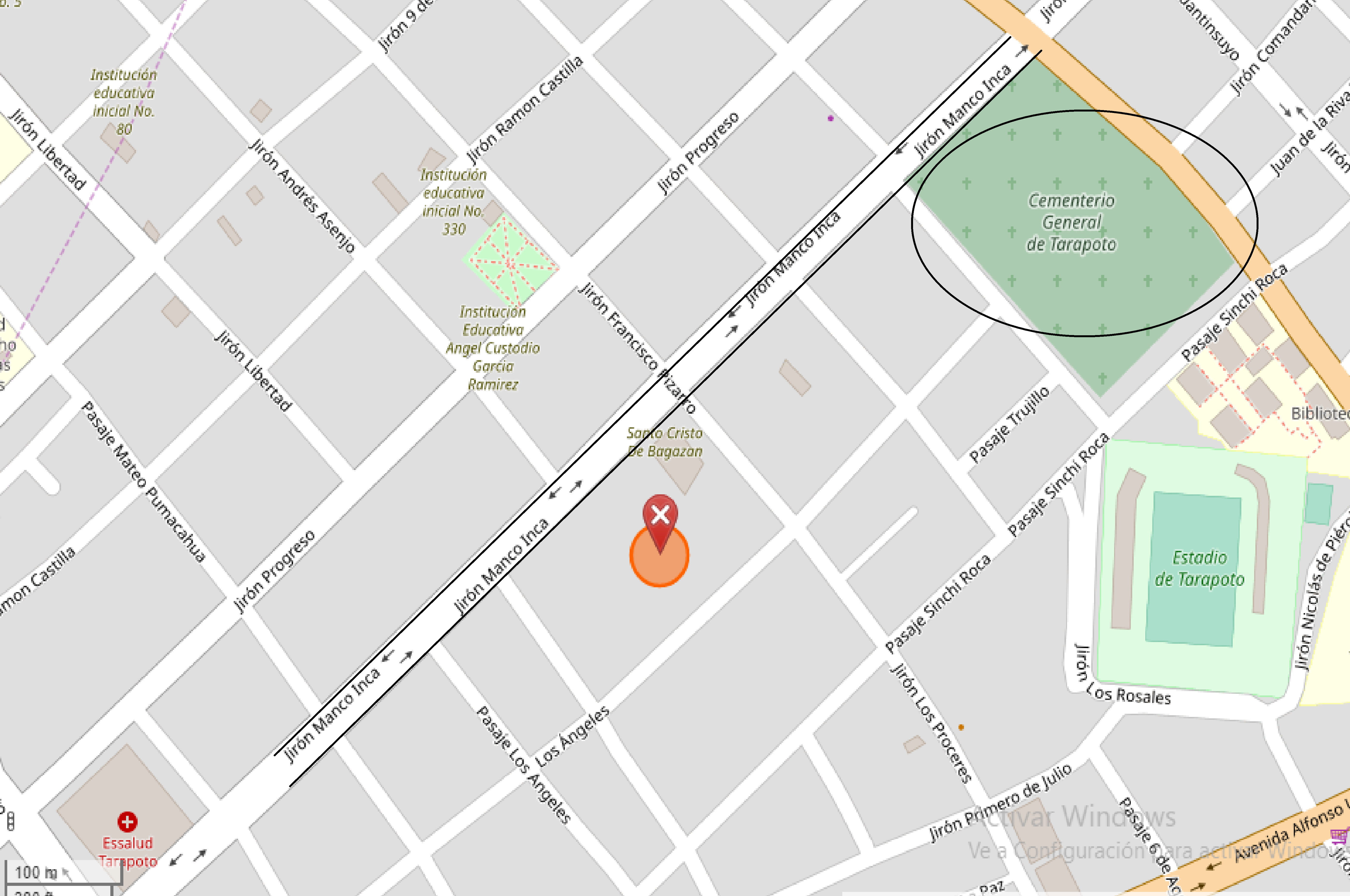 Masacre de Tarapoto en el jirón Túpac Amaru [1] This map may be incomplete, and may contain errors. Don't rely solely on it for navigation.